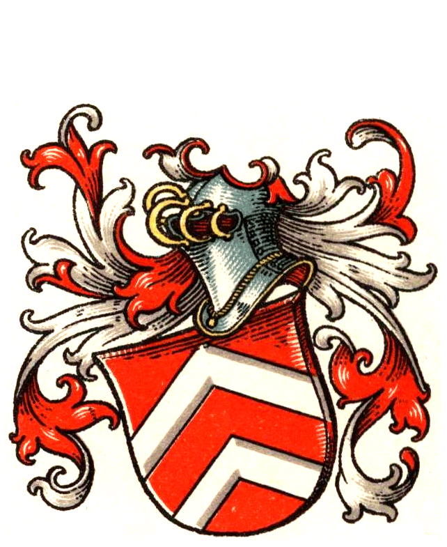 Wappen derer von Hardenberg